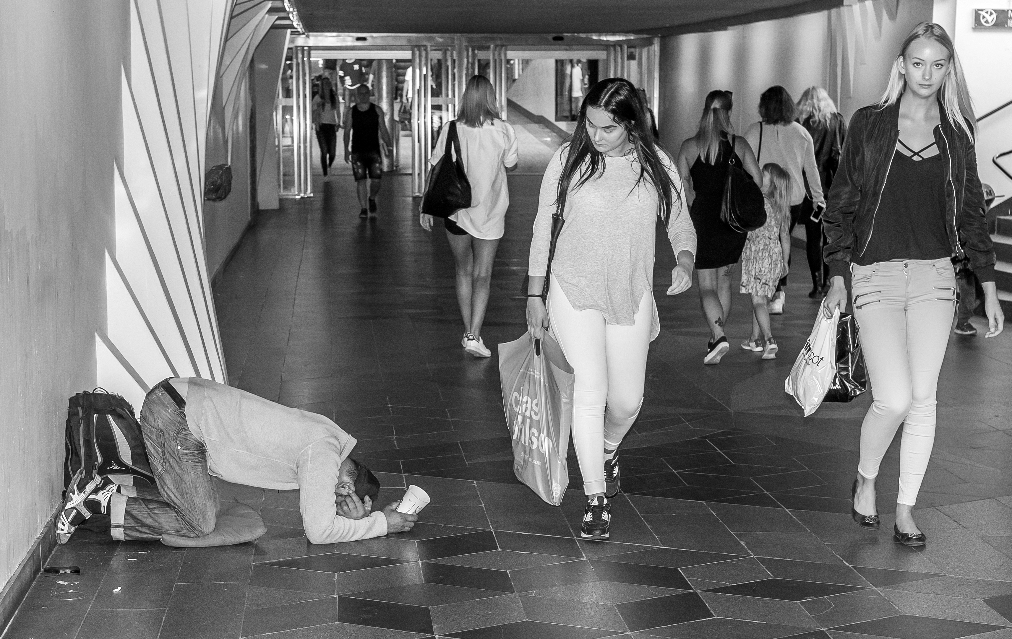 Göteborg Sweden July 2016